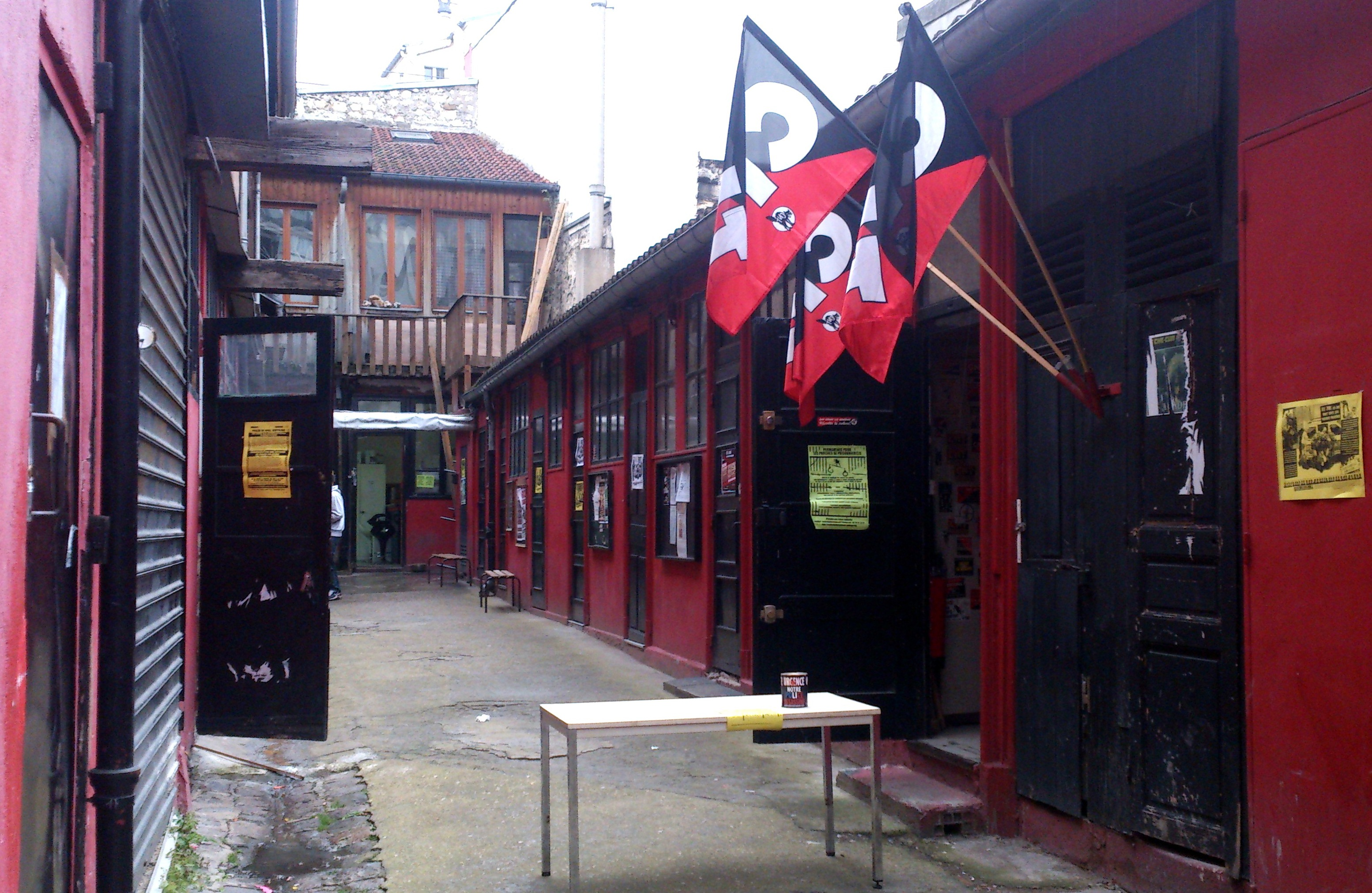 Siège parisien de la Confédération nationale du travail, 33, rue des Vignoles, à Paris.